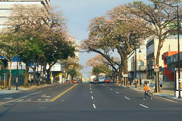 Paseo Colón de San José